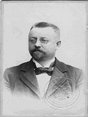 Heimrich Jan Nepomuk (*1853-†1933)